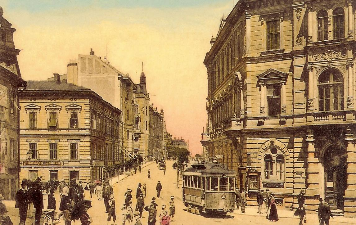 Tramwaj przed gmachem Kasy Oszczędności.